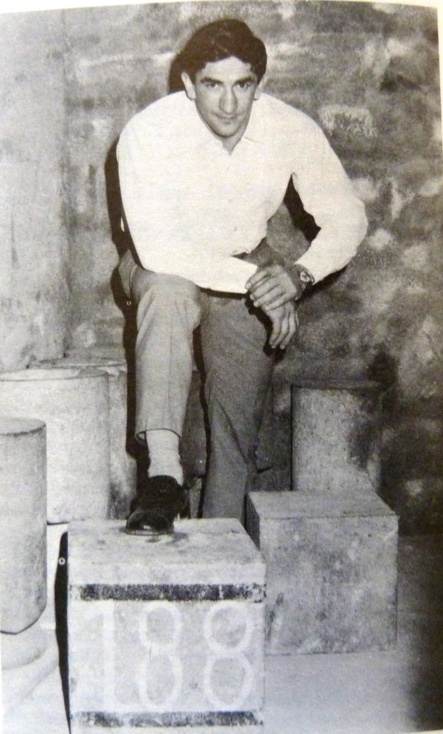 Urtain